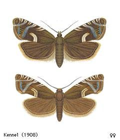 Cydia duplicana